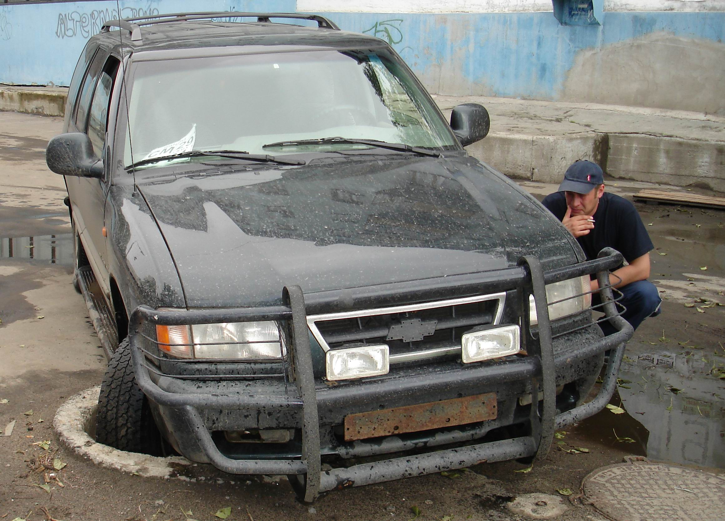 ДТП